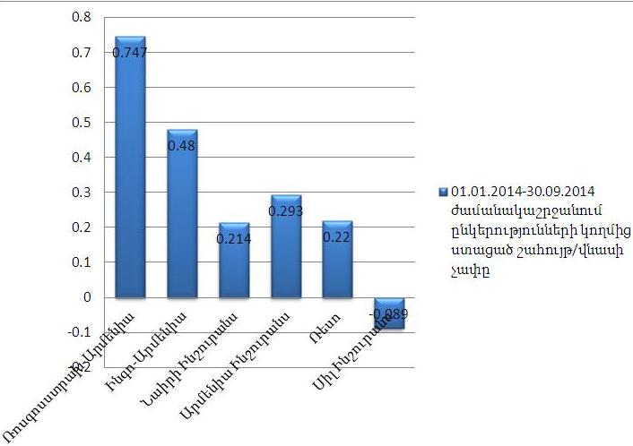 ՀՀ ապահովագրական շուկայի մասնակից ապահովագրական ընկերությունների կողմից հաշվեգրված շահույթը/վնասը 01.01.2014- 30.09.2014 ժամանակաշրջանի համար՝ արտահայտված միլիարդ դրամով: Տվյալները վերցվել են ընկերությունների հաշվետվությունների համաձայն